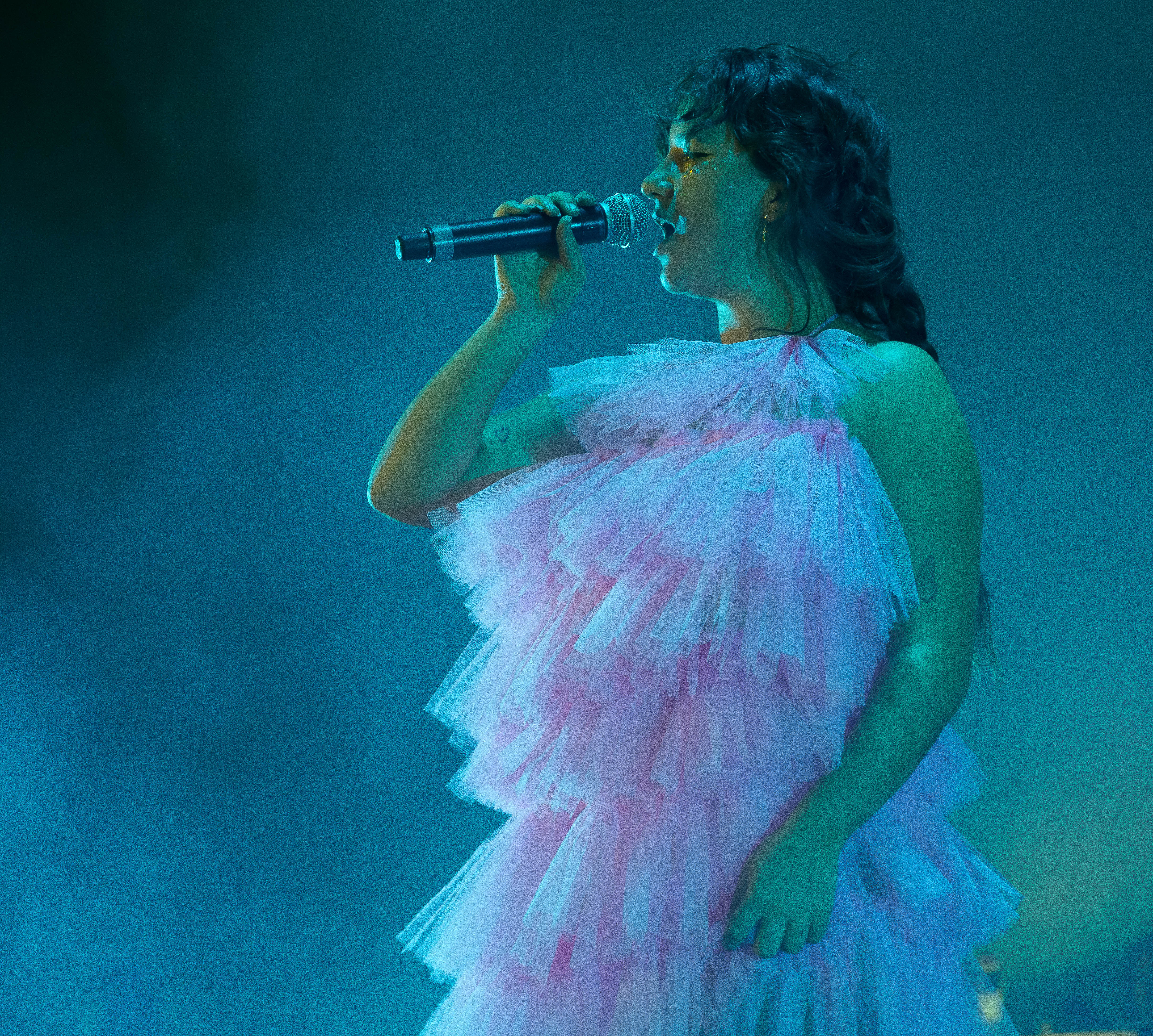 Mallrat